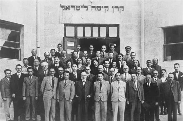 ירושלים - עובדי קק"ל בשנת 1940